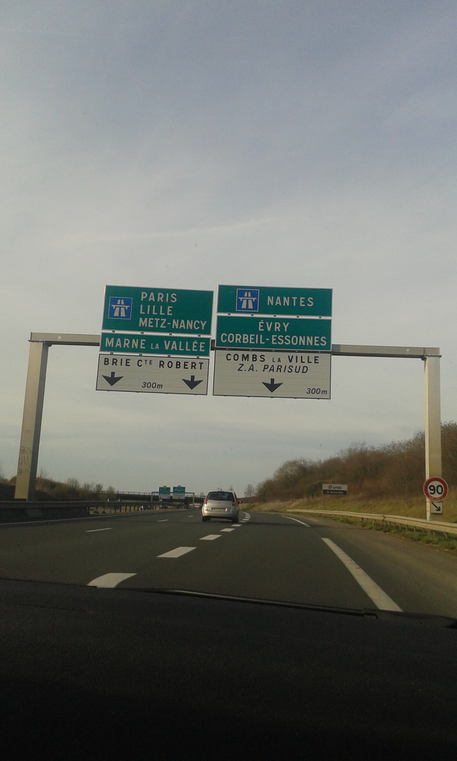 Panneau sur la fin de l'autorute française A5b (A105).